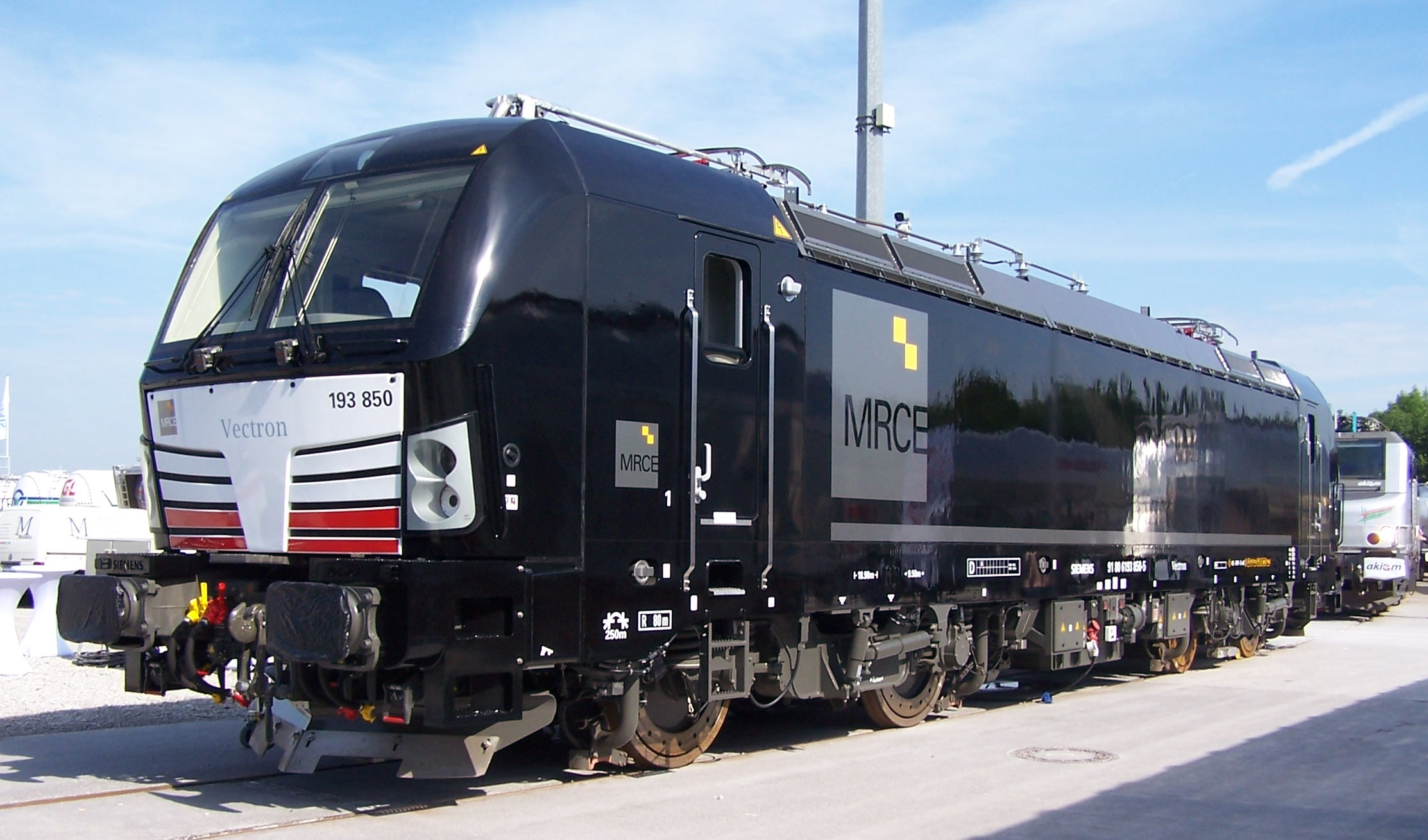 MRCE Siemens Vectron 193 850 auf der Transport logistic in München.